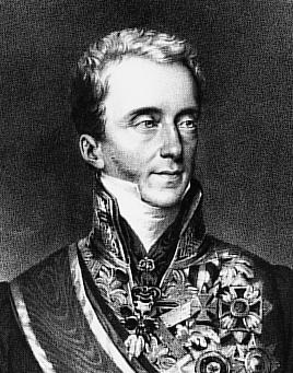 Franz Anton Kolowrat, gestorven in 1861.